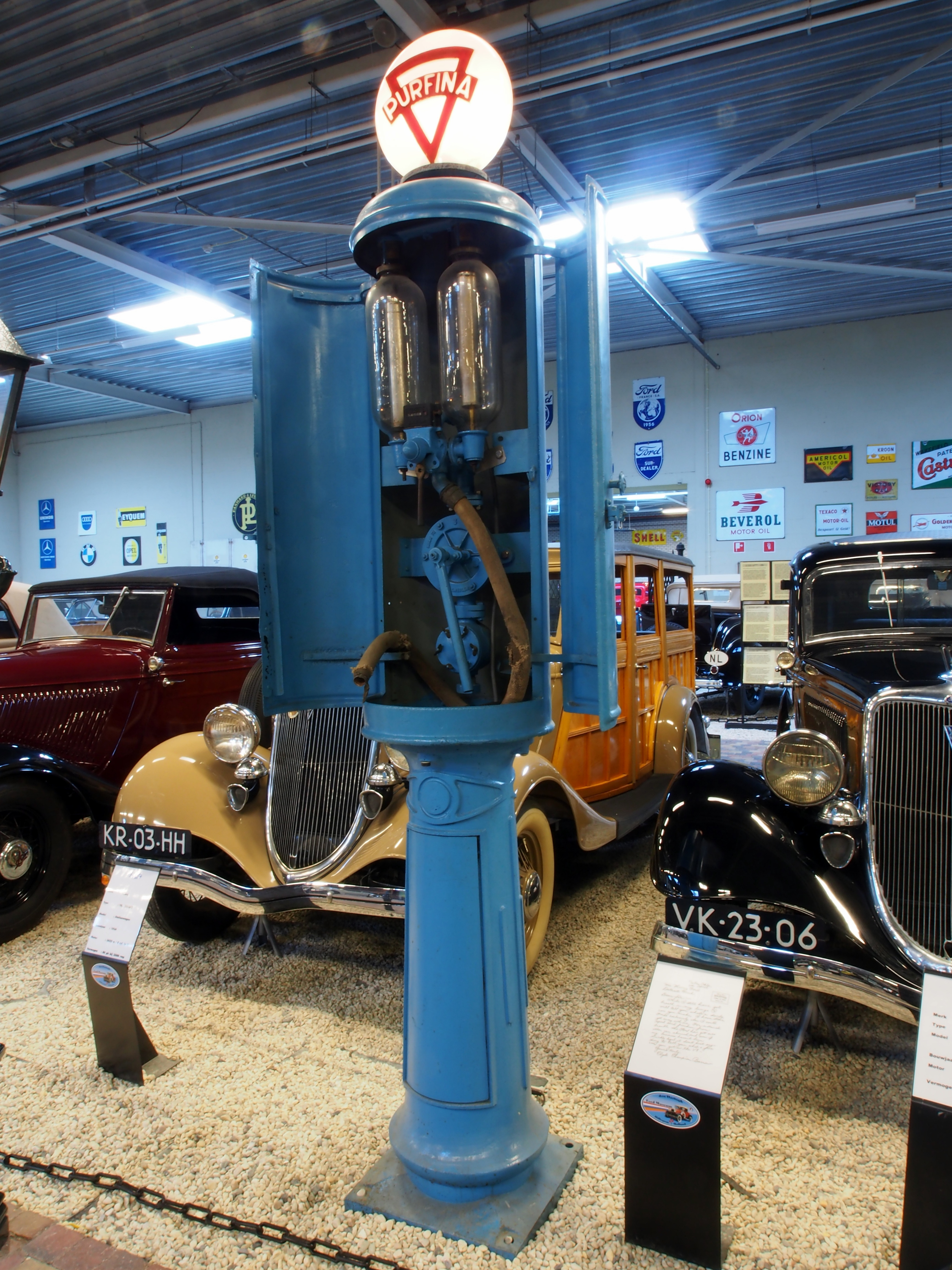 Den Hartogh Ford Museum.